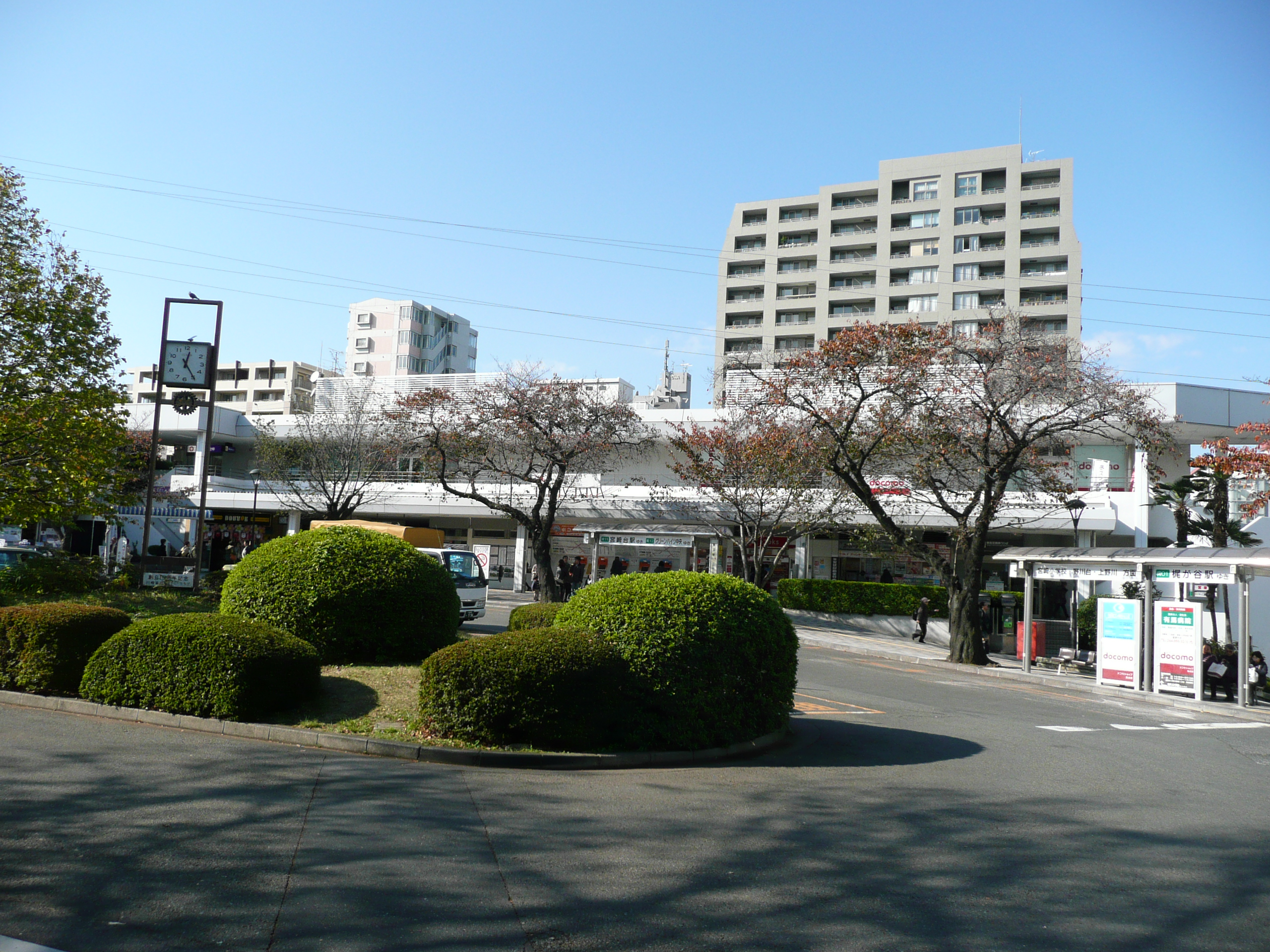 鷺沼駅正面口